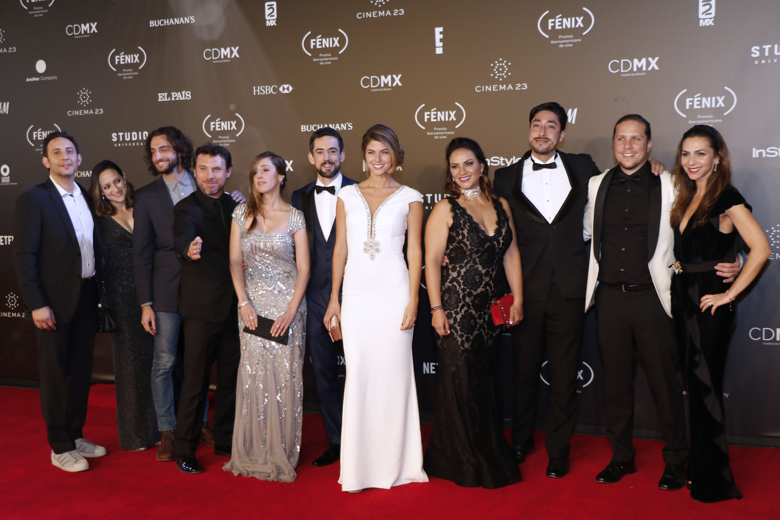 Miércoles 6 de diciembre de 2017En el Teatro de la Ciudad Esperanza Iris, se realizó la 4ª Entrega del Premio Iberoamericano de Cine, Fenix, previo a la ceremonia, nominados, conductores, presentadores y elencos, desfilaron por la alfombra roja.Fotografía: Milton Martínez / Secretaría de Cultura CDMX